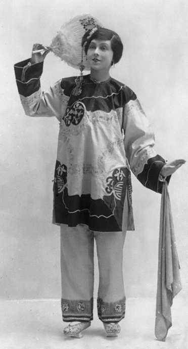 Christine Rayner